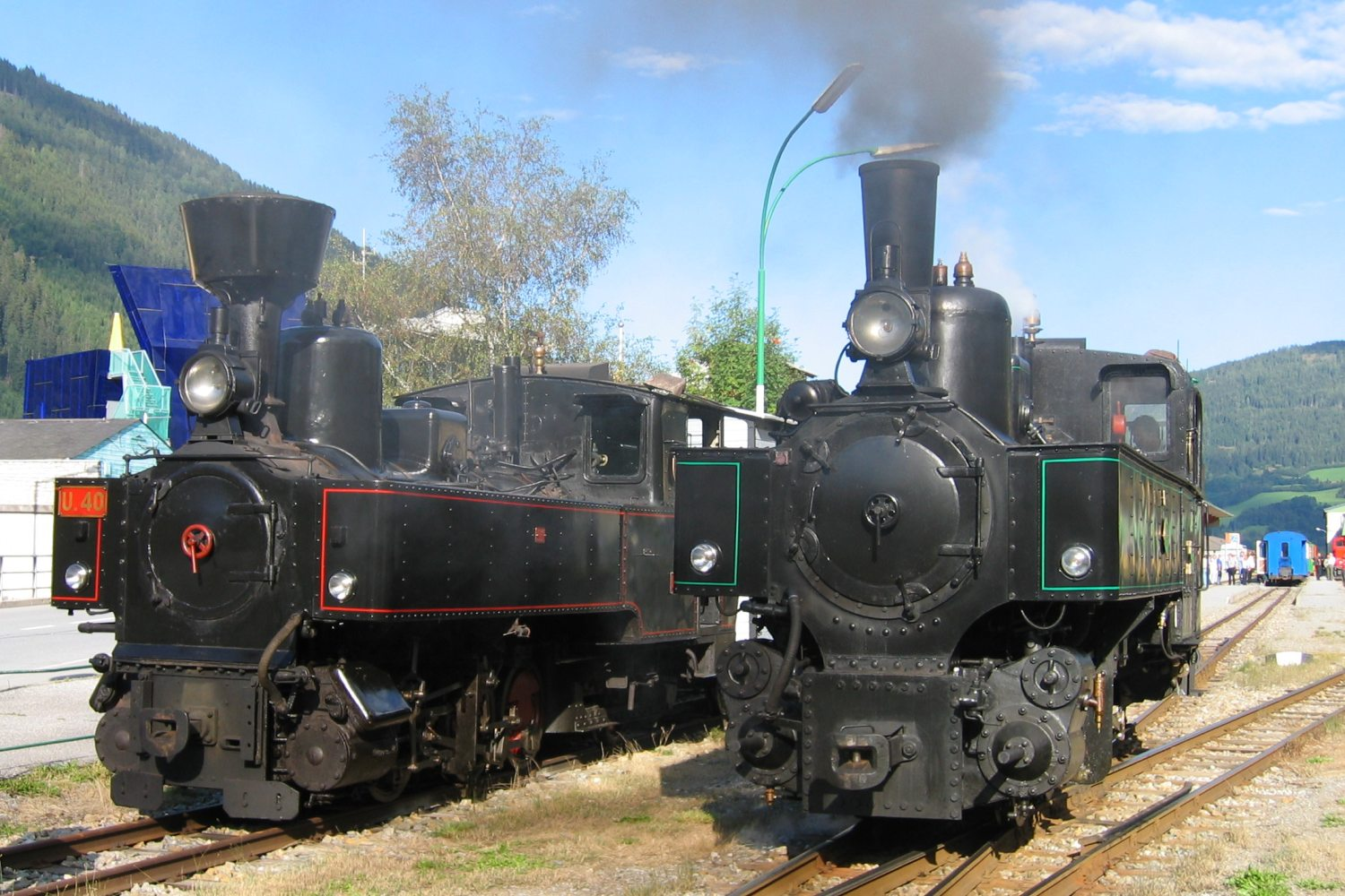 en: Steiermärkische Landesbahnen U40 and advanced development Bh.1, which was originally built for the Mariazellerbahn, in Murau station, center of operation of the Murtalbahn in Styria. de: Steiermärkische Landesbahnen U40 und die Weiterentwicklung Bh1, ursprünglich für die Mariazellerbahn gebaut, im Bahnhof Murau, dem Betriebsmittelpunkt der Murtalbahn.